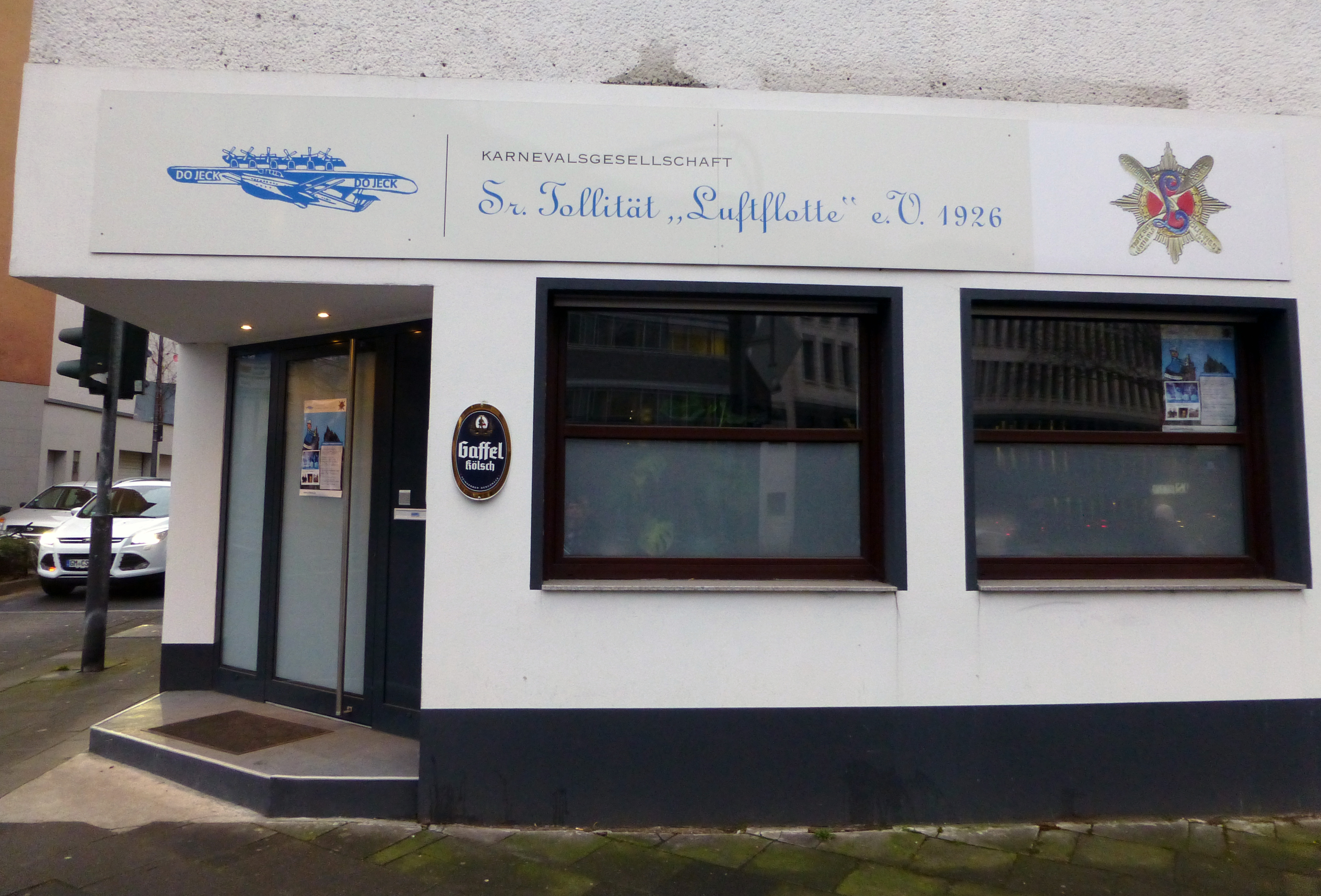 Geschäftsstelle KG Sr. Tollität Luftflotte Köln, Josephstraße 45-47